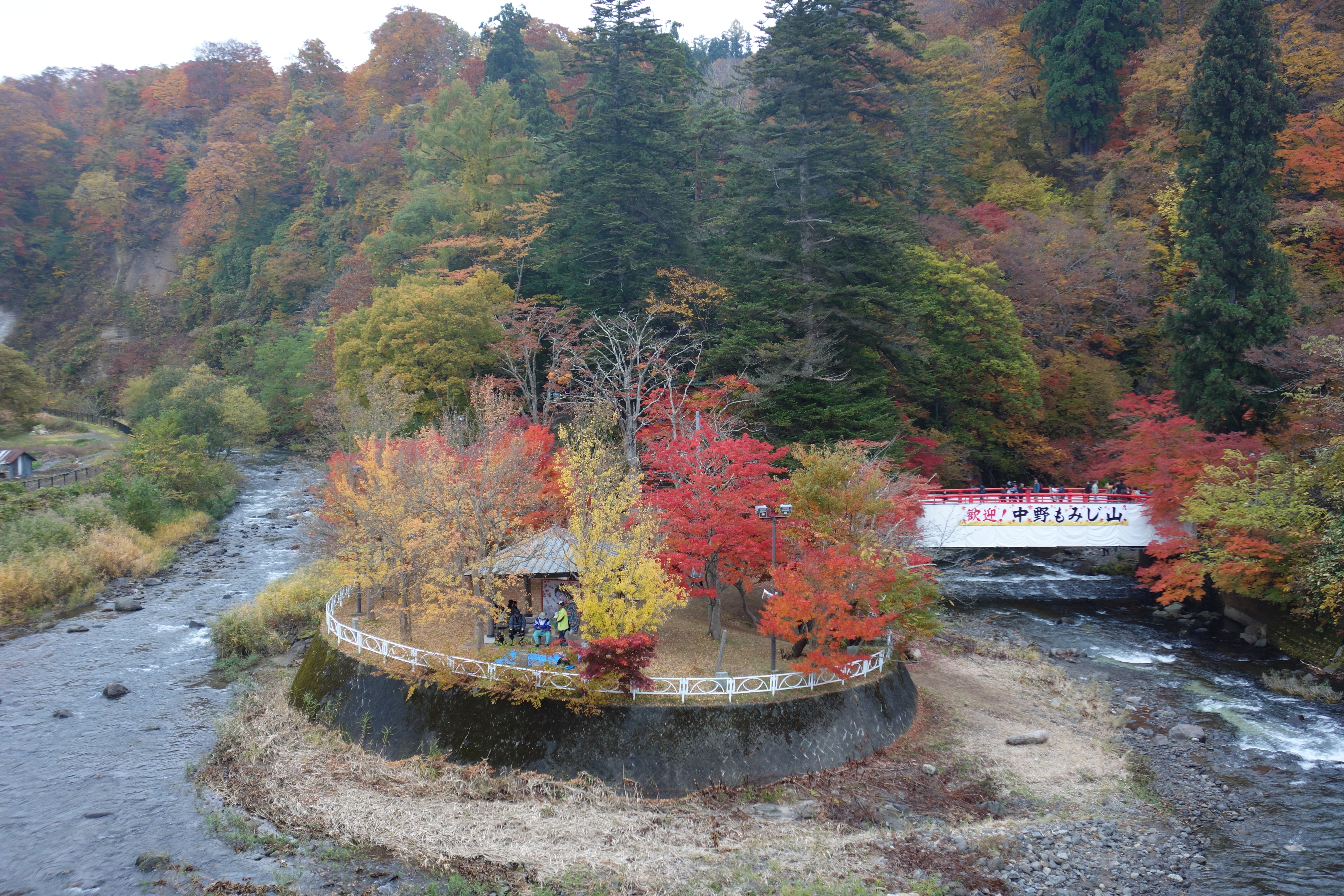 中野もみじ山